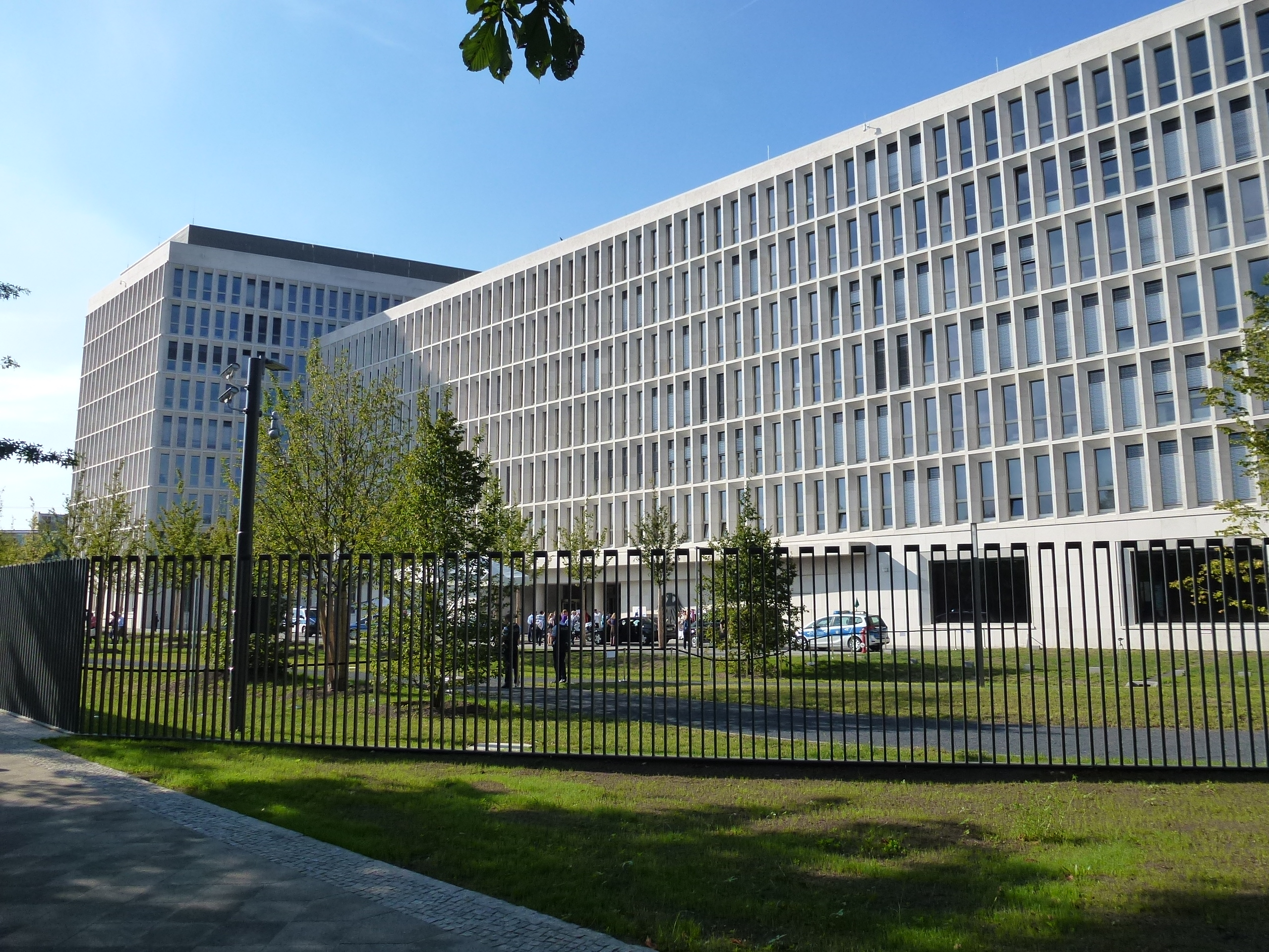 Bundesministerium des Innern (Berlin-Moabit) Südseite